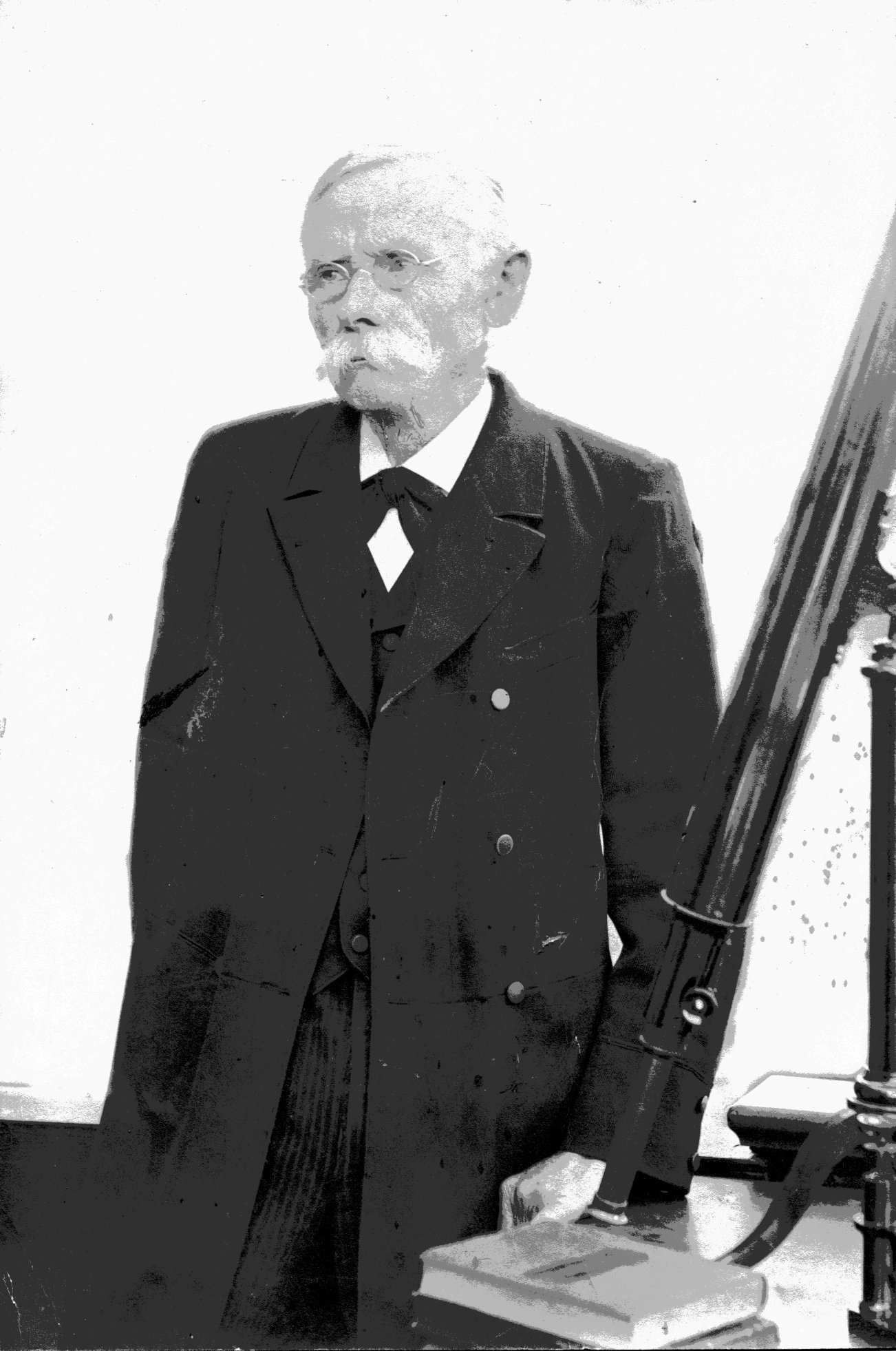 Moritz Hensoldt, (1821-1903), neben einem seiner astronomischen Fernrohre